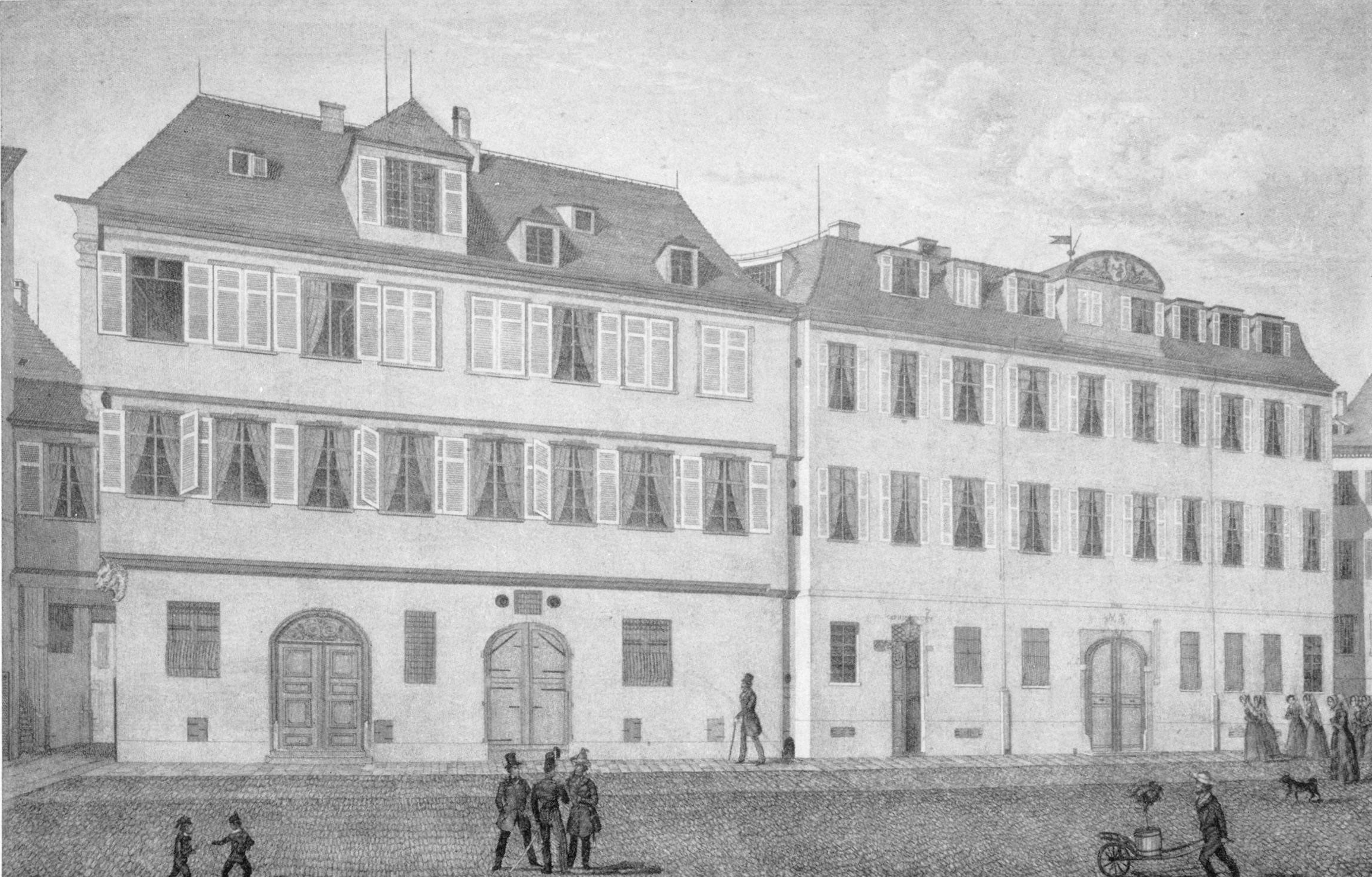 Katharinenstift Stuttgart, Stahlstich von Theodor Rausche, vor 1850, Heimatmuseum Ludwigsburg.